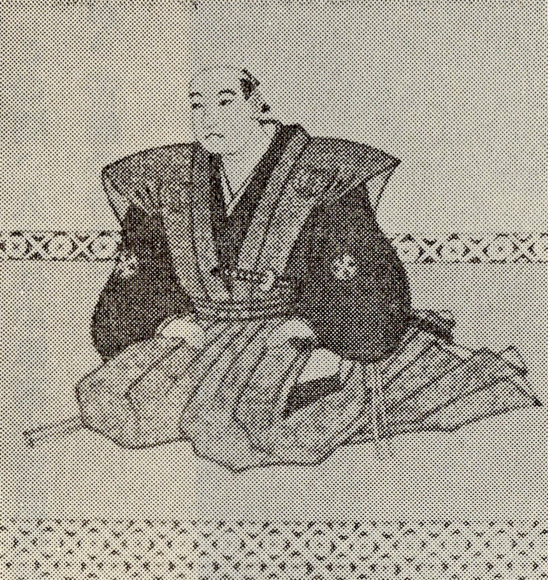 中川久慶の肖像(モノクロ)。